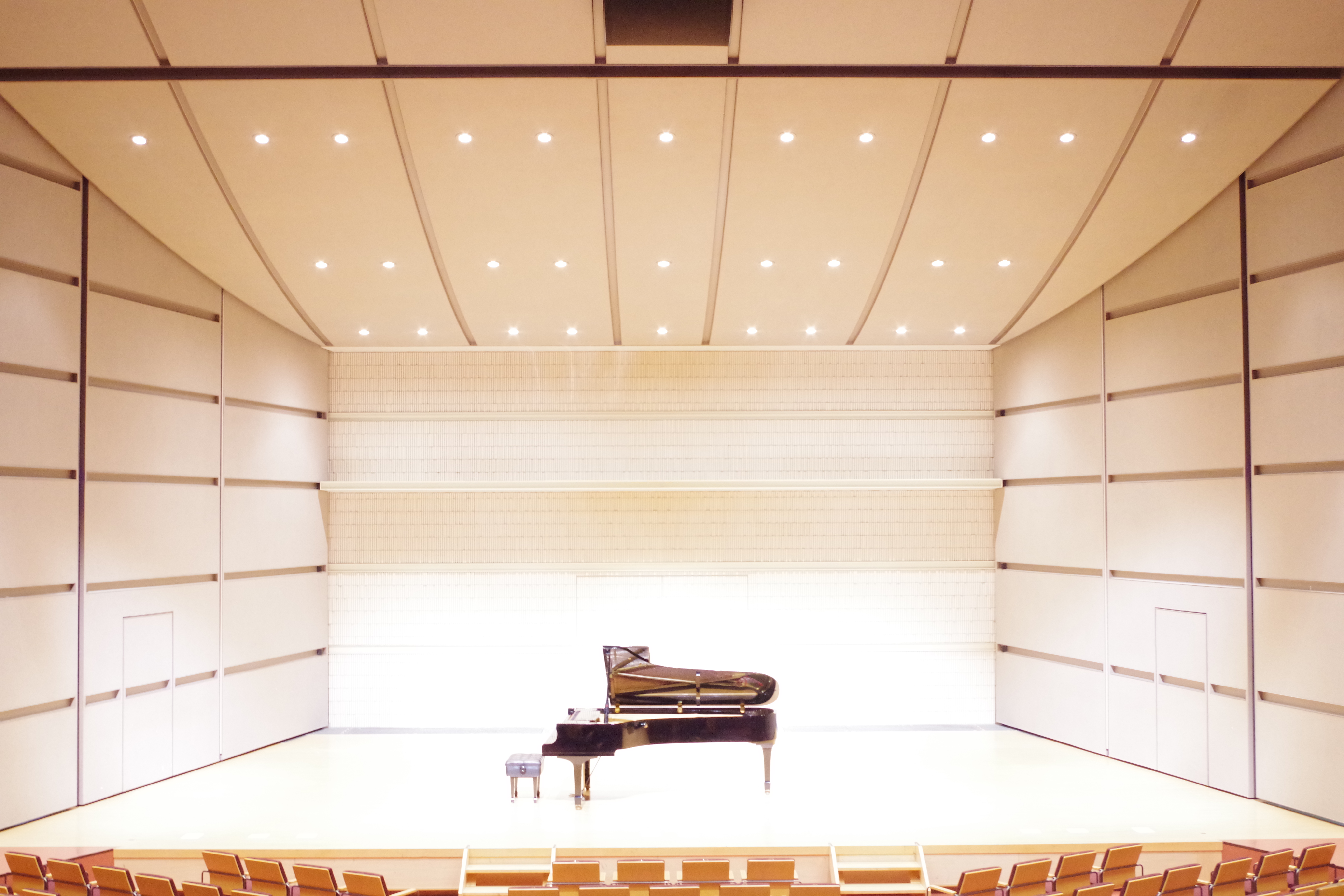 客席中央から撮影